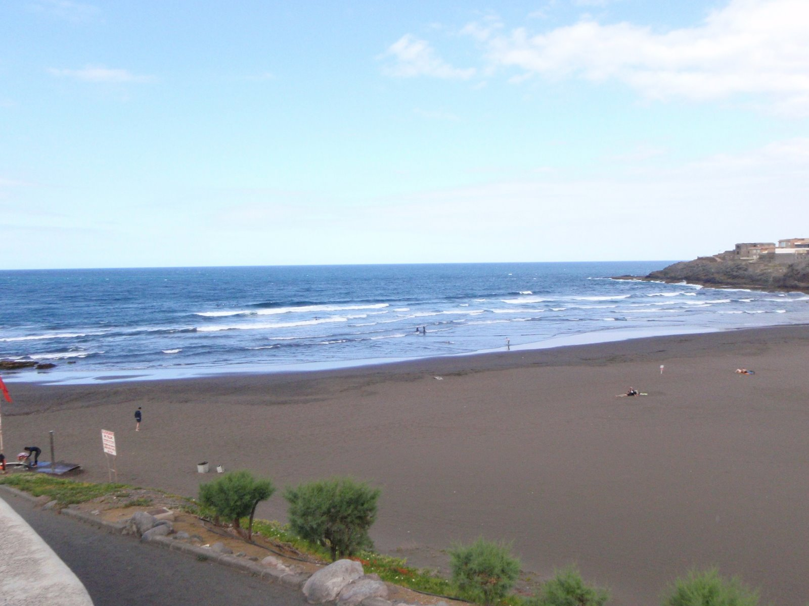 Foto de playa del hombre tomada por Aidilrehtse